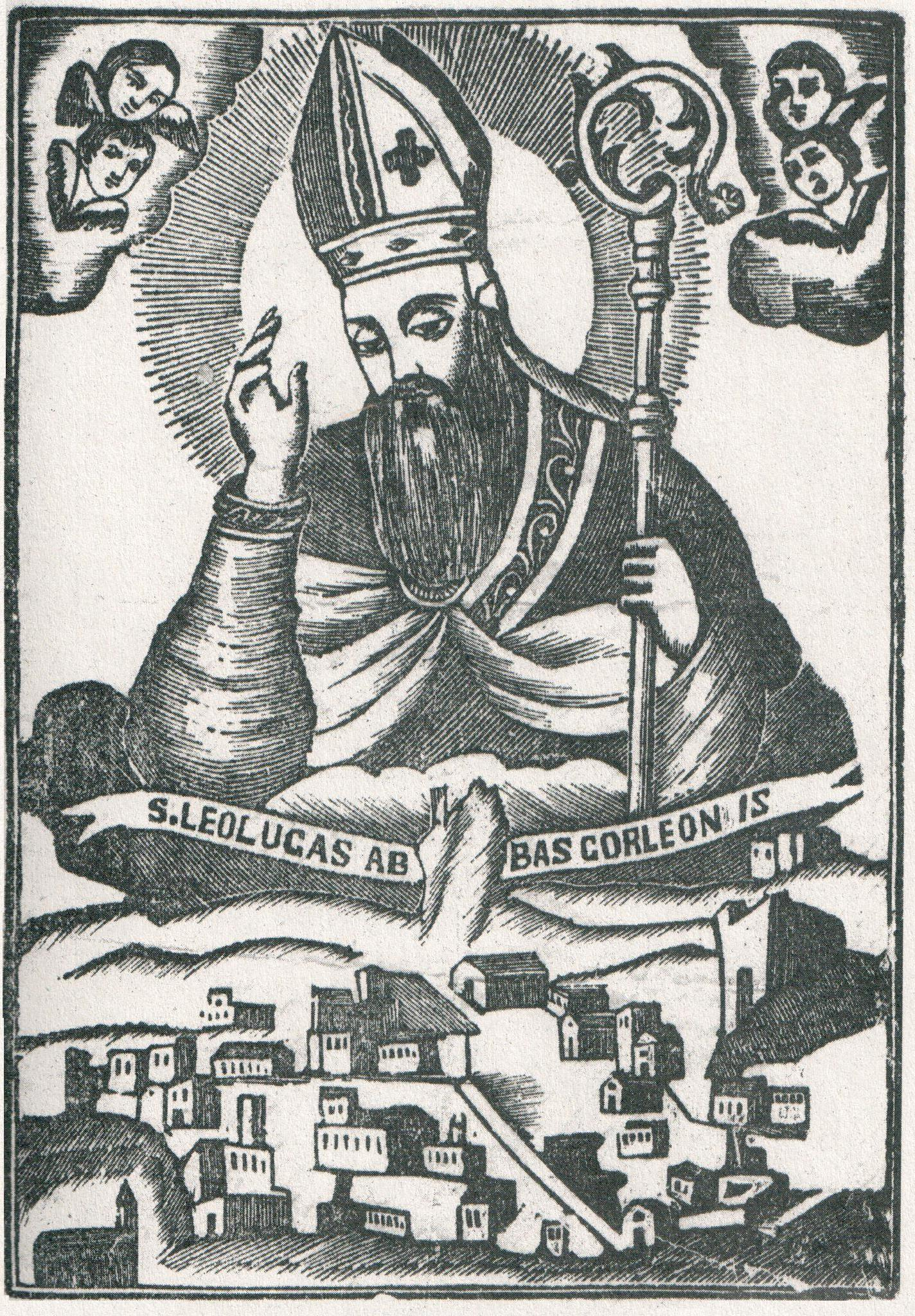 immagine votiva di San Leoluca Abate protettore di Corleone